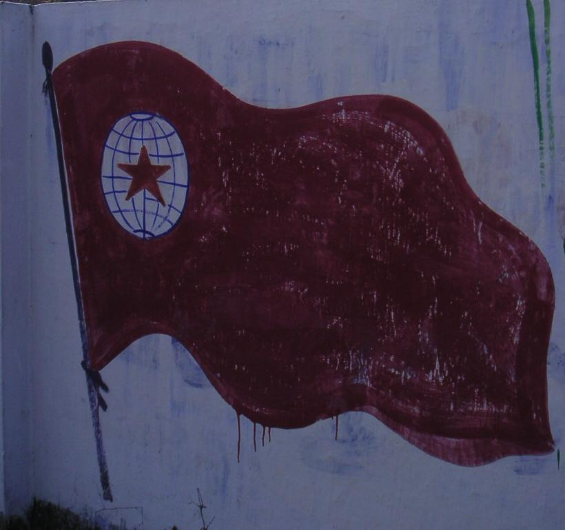 JSS logo